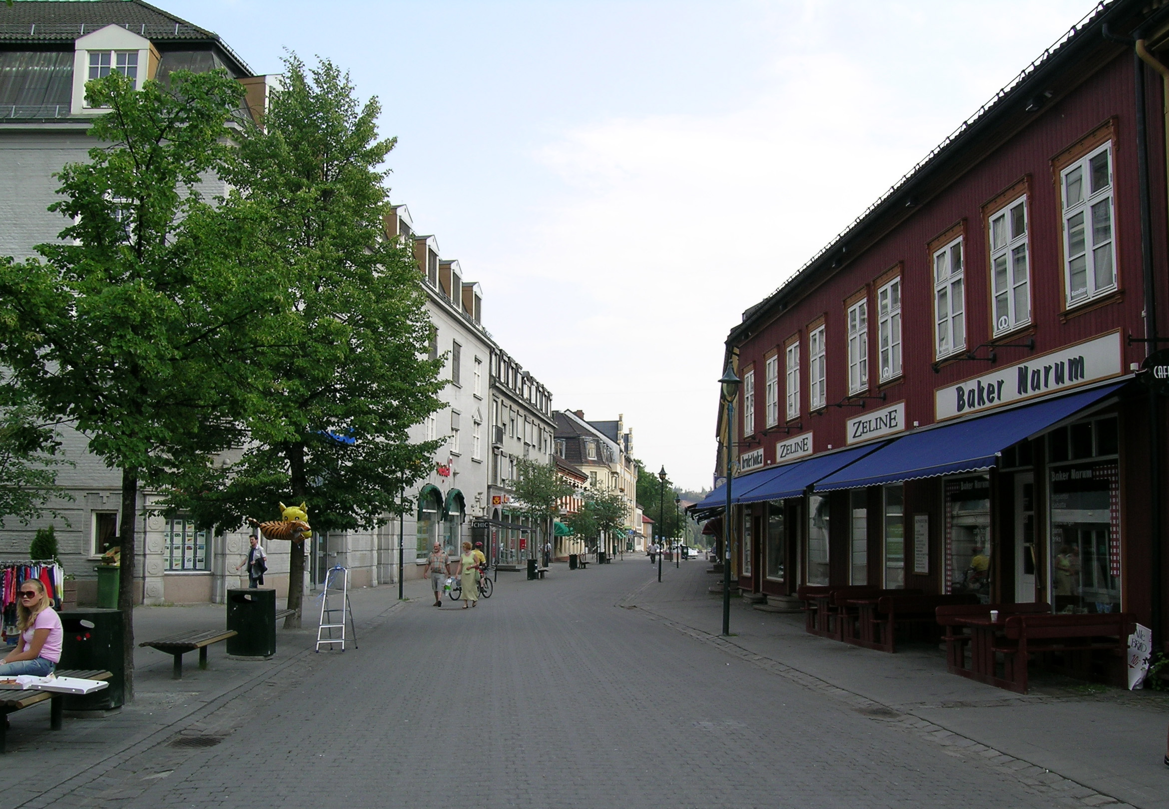 Hønefoss, Ringerike. Storgata.